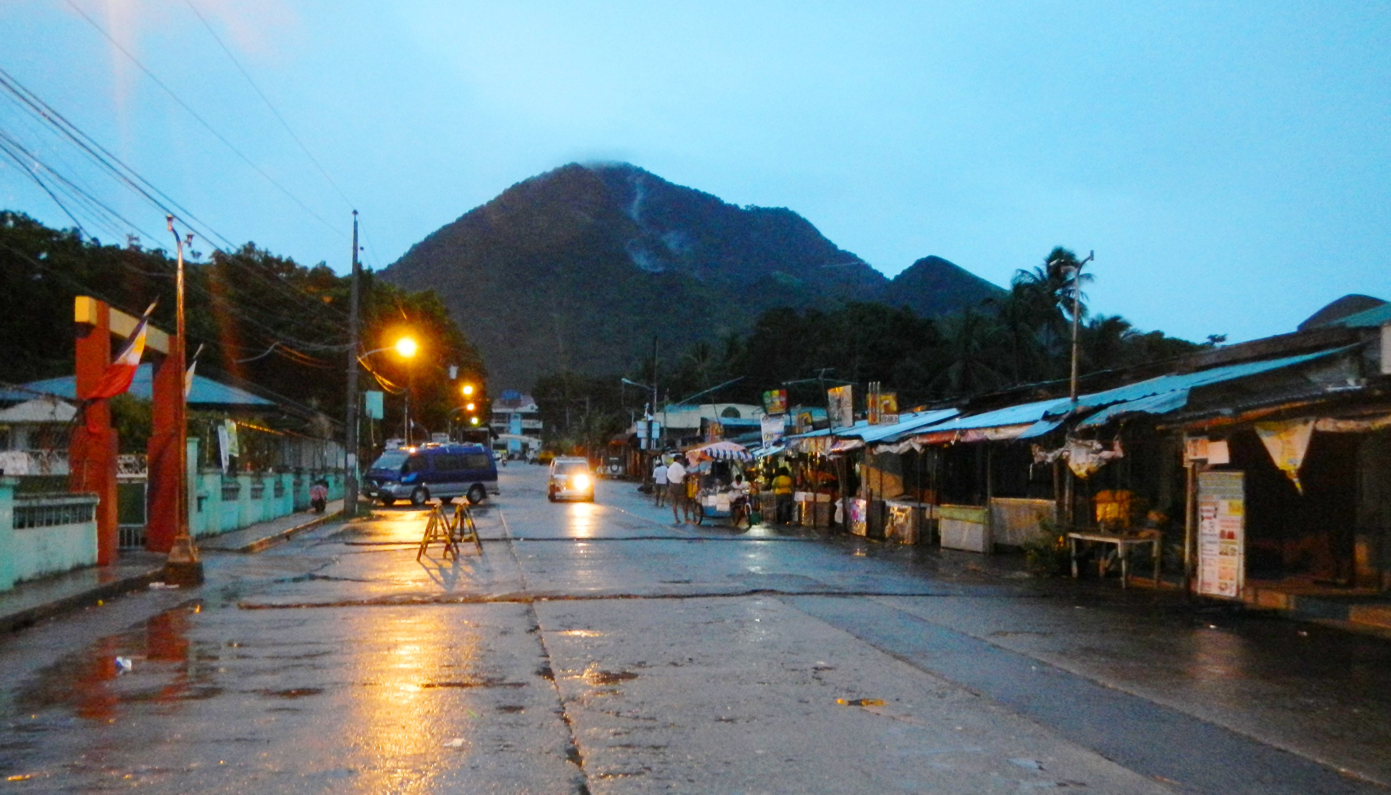 Cuenca, Batangas, Philippines